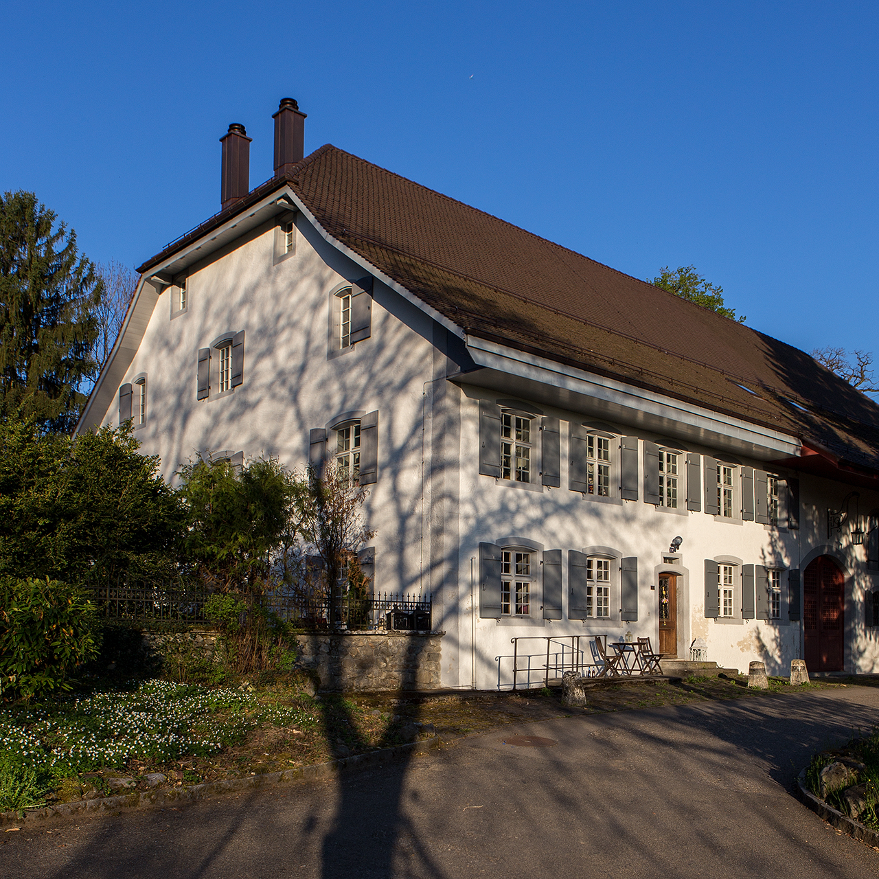 Ehemaliges Gasthaus zum Elefant neben dem Schloss in Hilfikon (Gemeinde Villmergen)